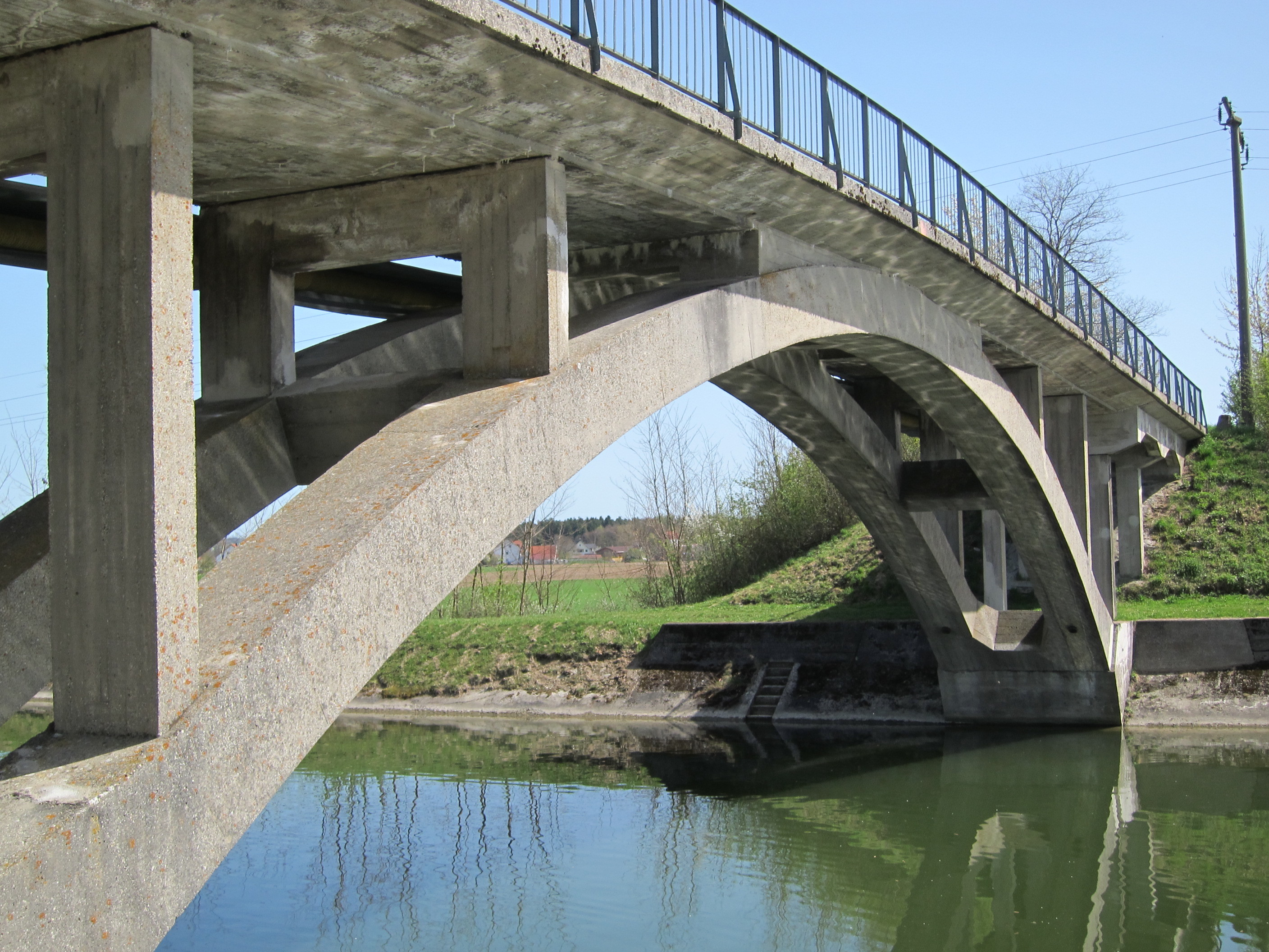 Betonbogenbrücke über den Mittlere-Isar-Kanal, häufig verwendeter Standardtyp